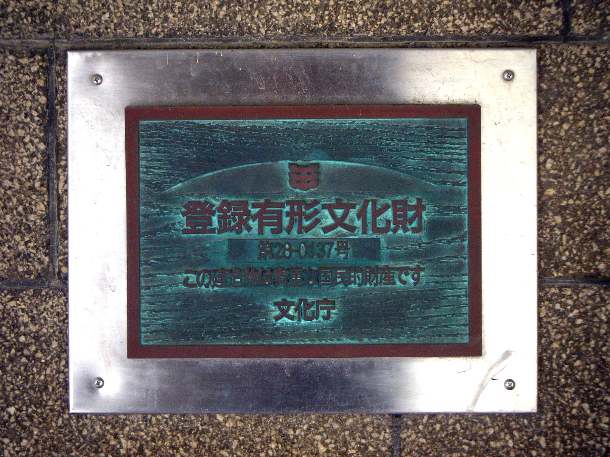 大庄公民館にある、登録有形文化財の標識。